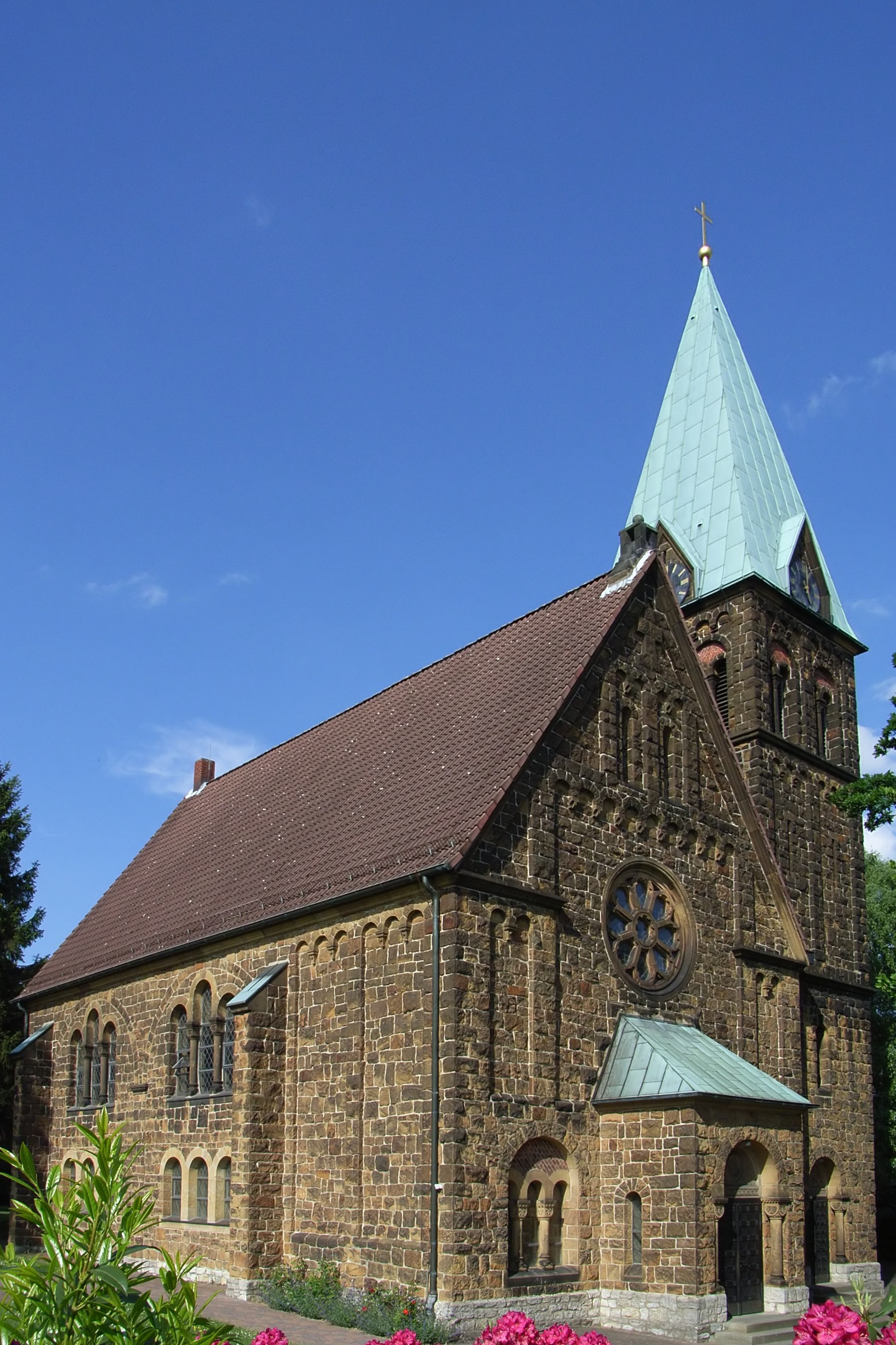 Bielefeld, Deutschland: Evangelische Kirche im Stadtteil Brake.